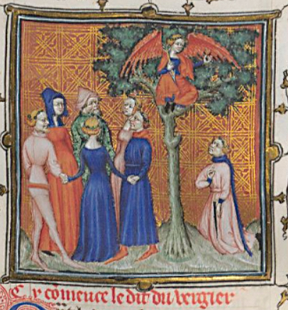 Iluminura Vision de Guillaume de Machaut de Le Dit du Vergier das obras completas de Guillaume de Machaut